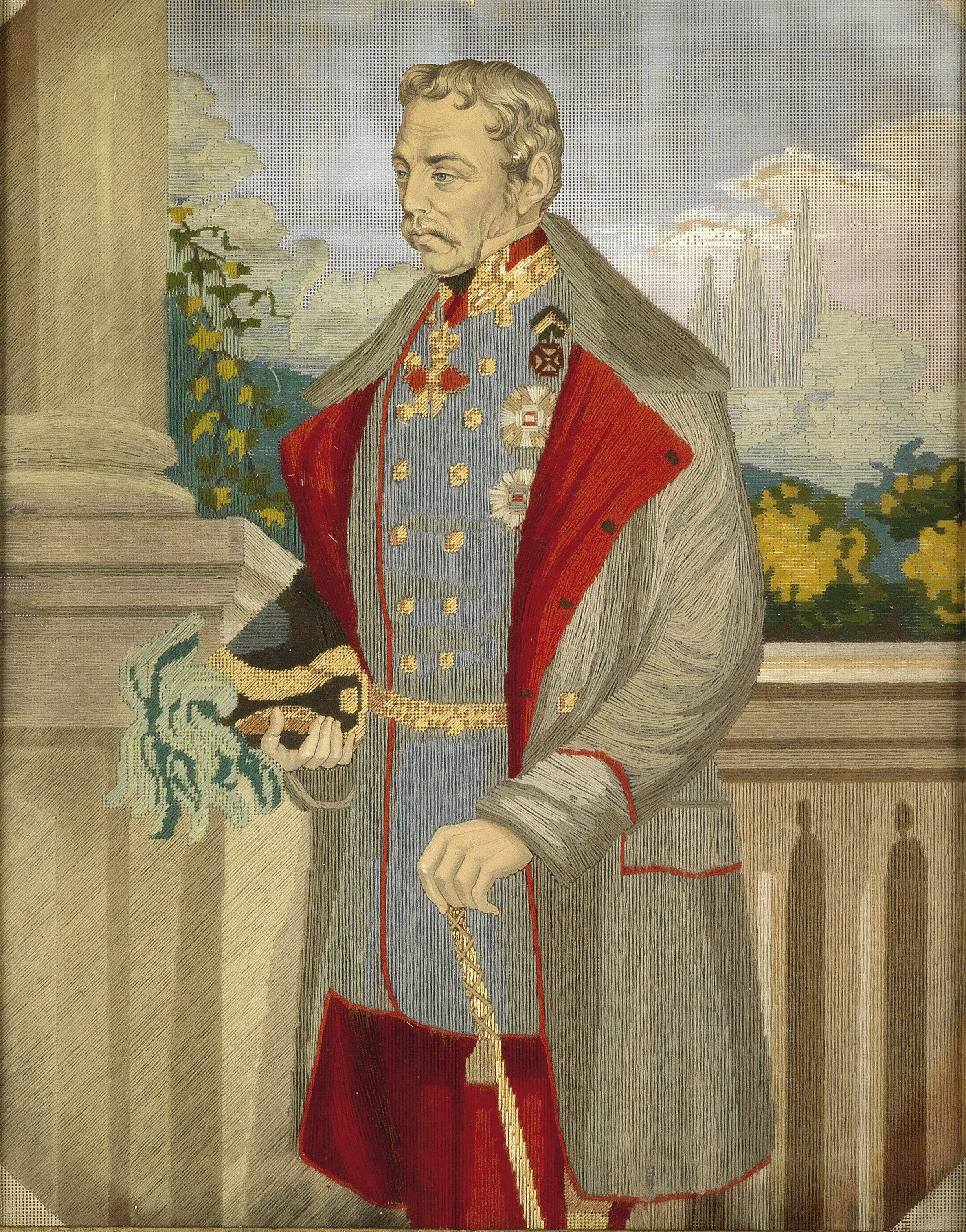 Graf Radetzky in Uniform, Seidenstickereibild (Kopf und Hände aus farbig getöntem Papier ausgeschnitten und aufgeklebt), 44.5 x 35,5 cm